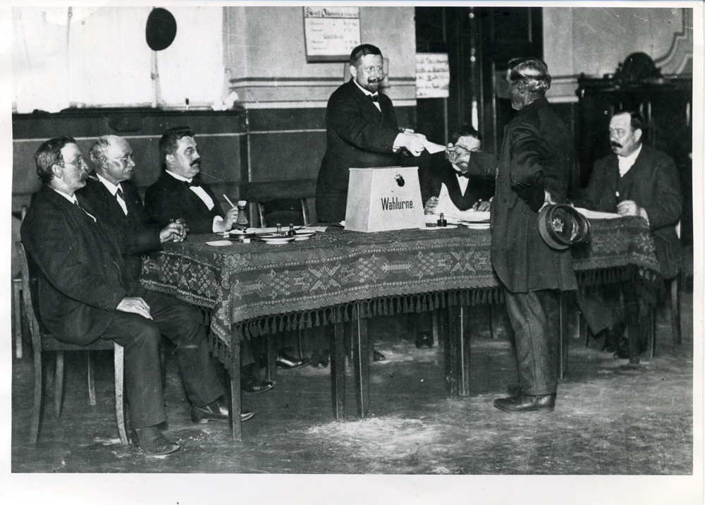 Reichstagswahl 1912. Wahllokal in Berlin-Neuköln.